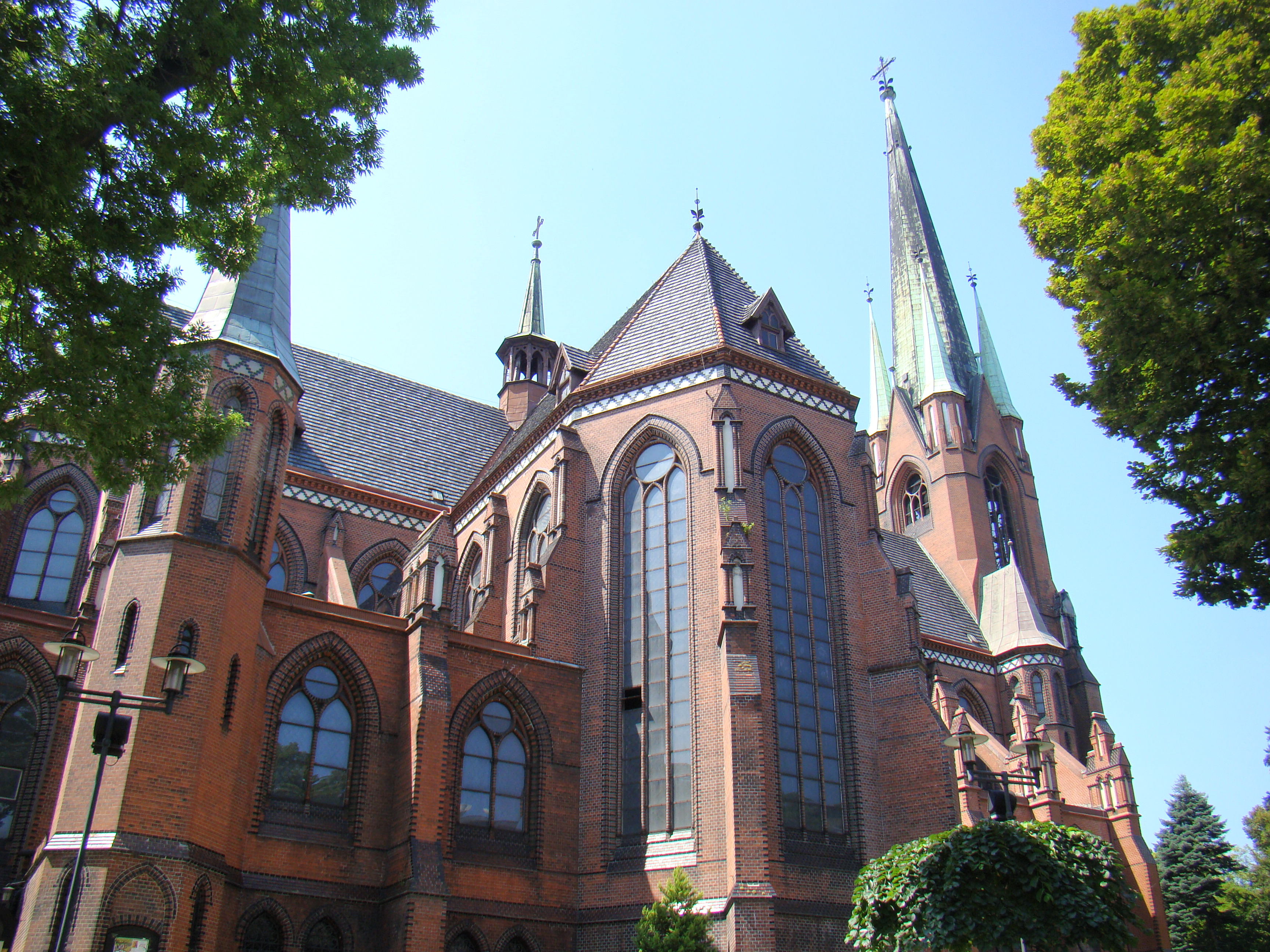 Gliwice, Katedra Świętych Apostołów Piotra i Pawła, wzniesiona w latach 1896-1900 według projektu Brunona Heera w stylu neogotyckim. Granice ochrony obejmują kościół wraz z najbliższym otoczeniem zieleni w ramach działek.